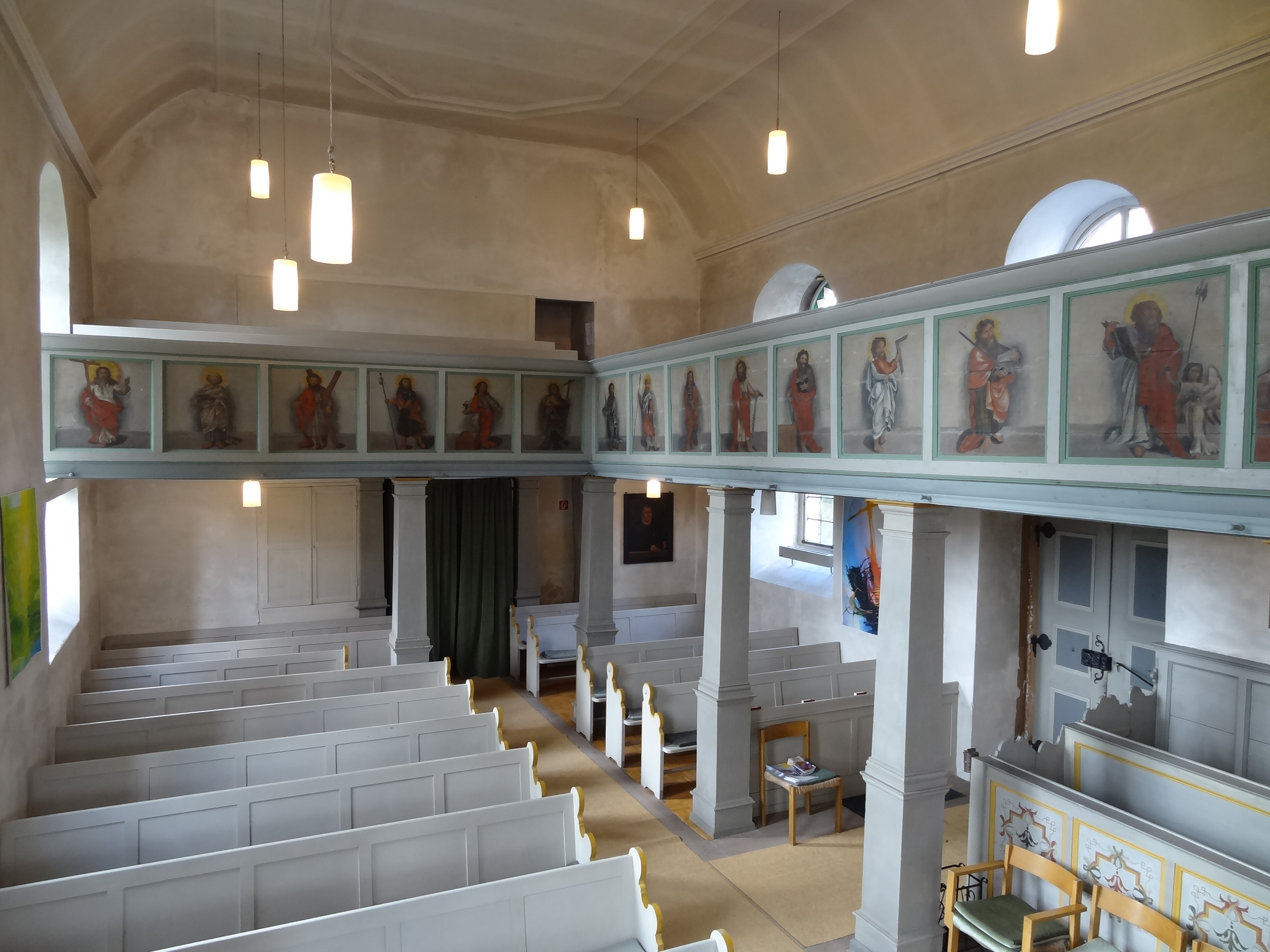 Evangelische Kirche Nieder-Bessingen